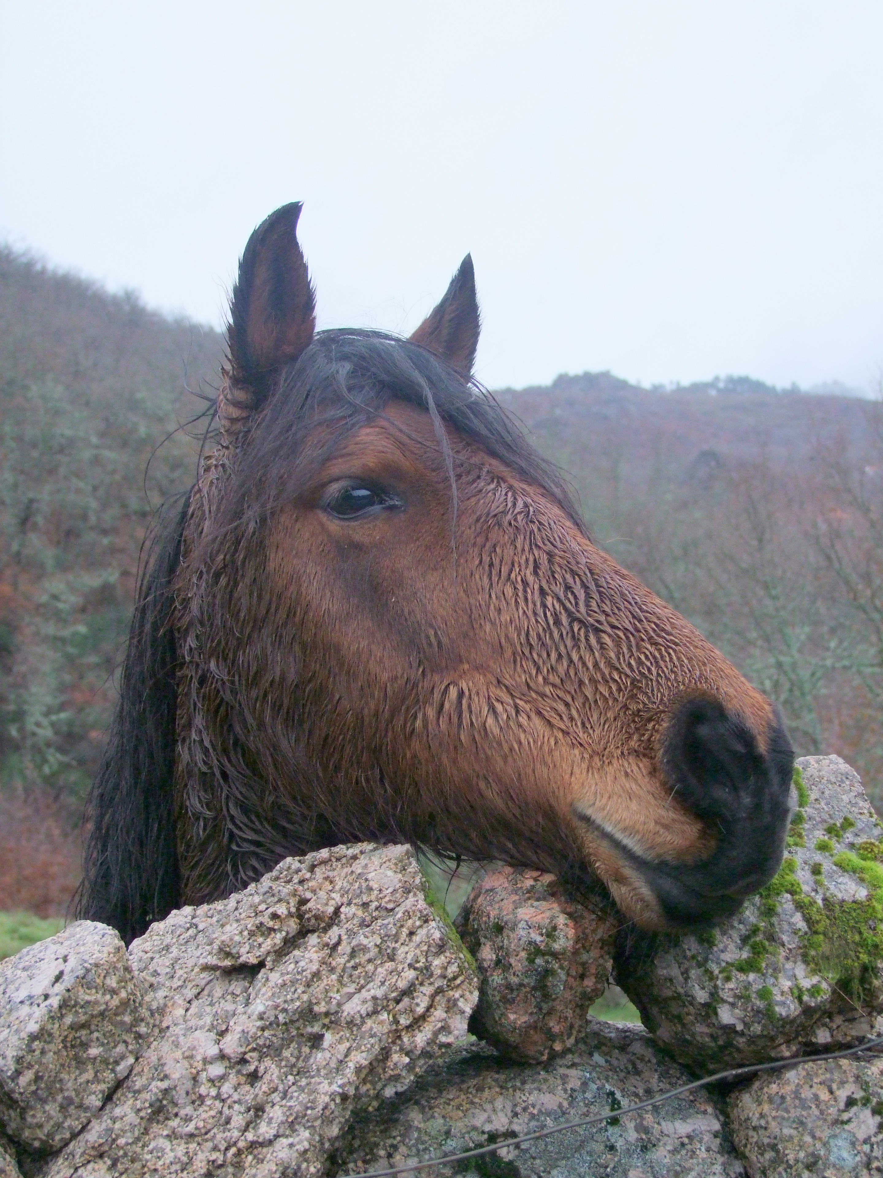 Lugar de Podre, Castro Laboreiro, Jan2010